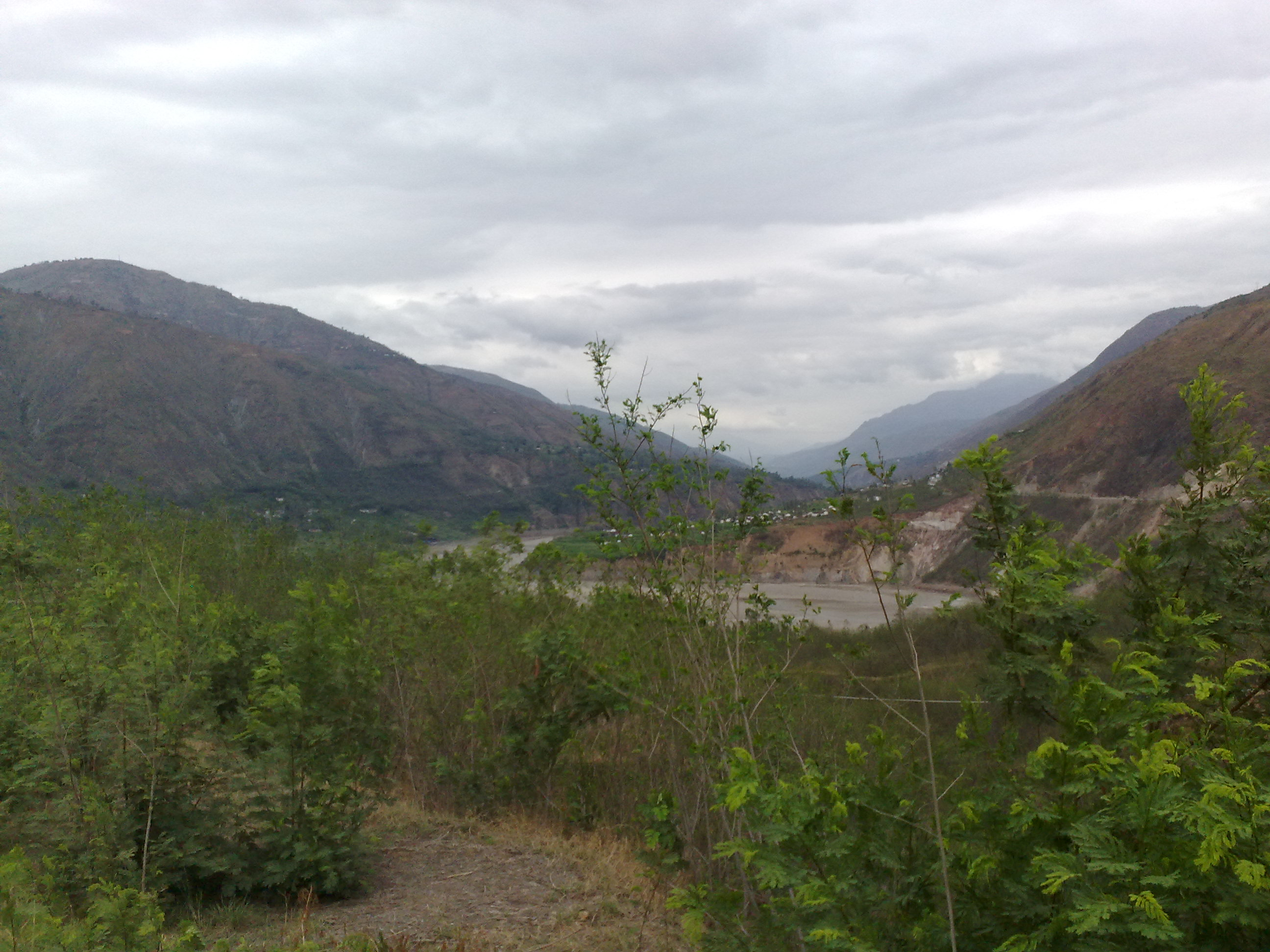 Huidong, Liangshan, Sichuan, China